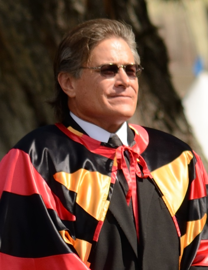 Quentin of Kawananakoa